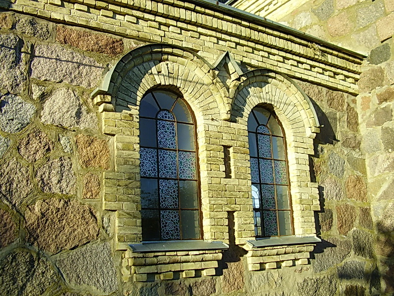 Старыя Габы. Свята-Мікалаеўская царква